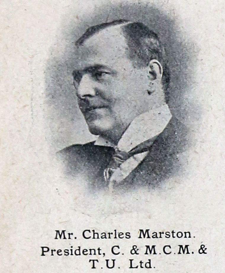 Fotografía de Charles Marston publicada en 1910